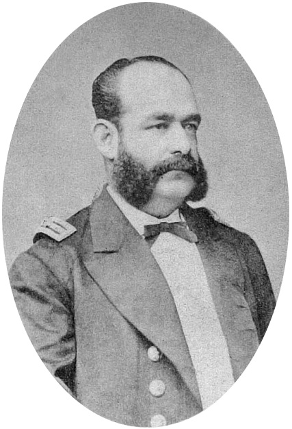 Miguel Grau Seminario (*Piura, Perú, 27 de julio de 1834 - † Punta Angamos, 8 de octubre de 1879) fue un marino peruano, almirante de la Marina de Guerra del Perú y destacado héroe peruano.